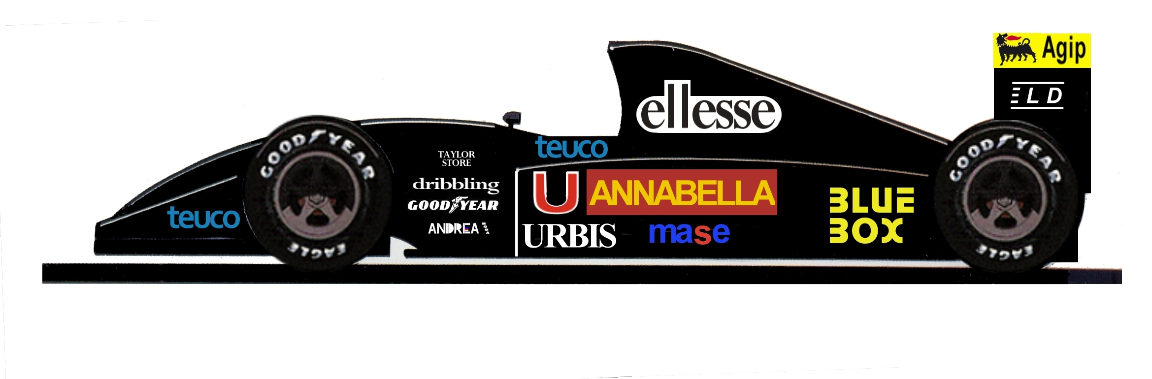 Andrea Moda S921 Formel-1-Auto, Lackierung Monaco 1992